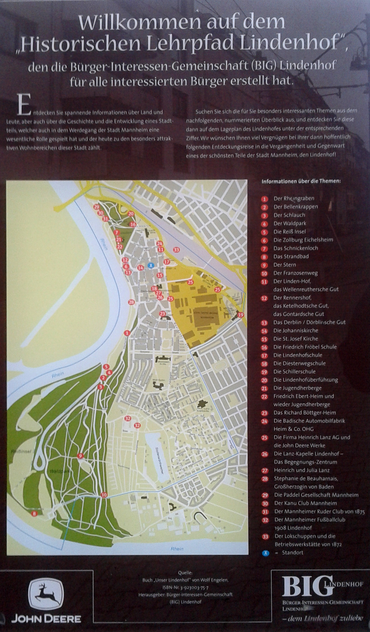 Historischer Lehrpfad Lindenhof, Tafel in Mannheim-Lindenhof, Meerfeldstr./Windeckstr.